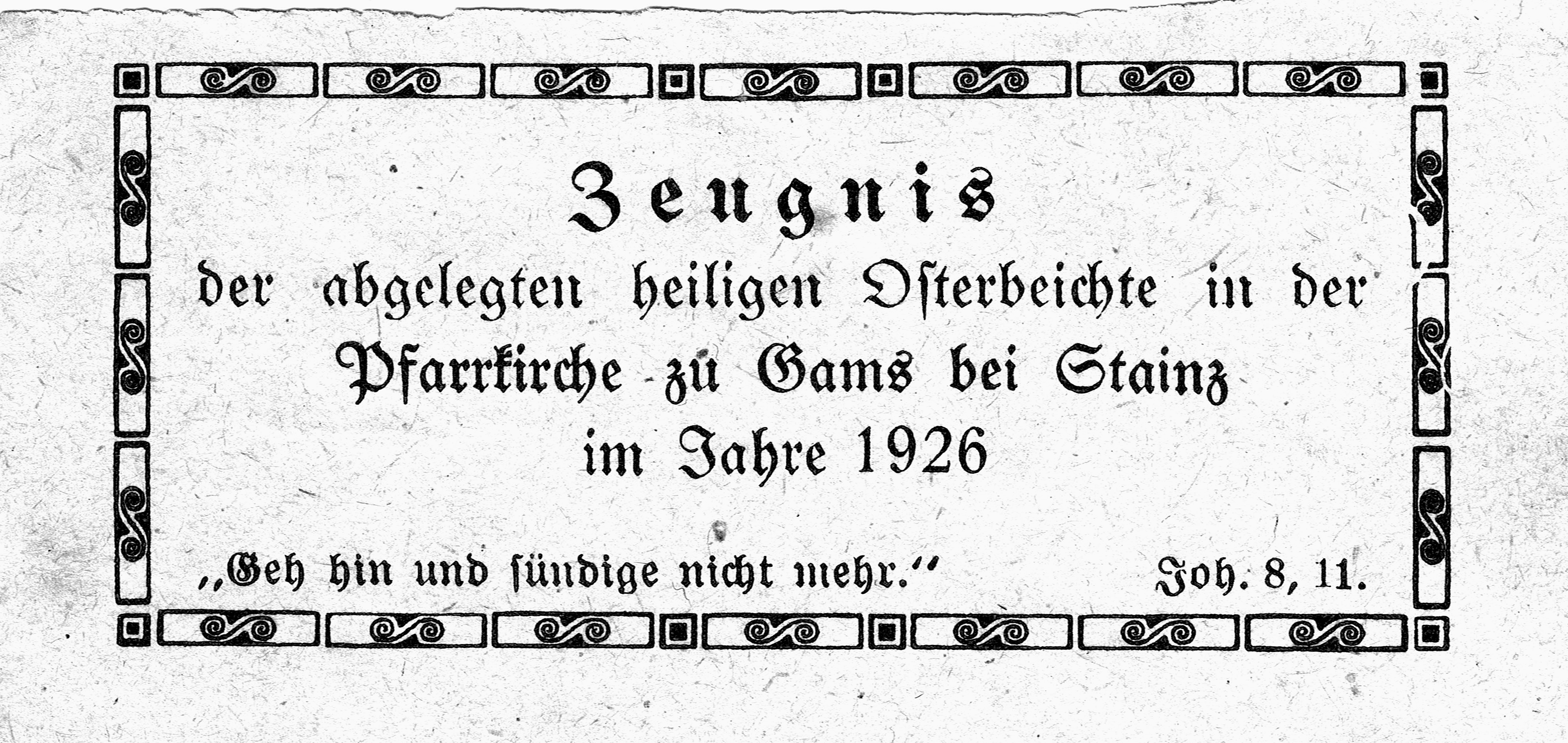 Bestätigung über die abgelegte Beichte in der Pfarrkirche Gams ob Frauental bei Deutschlandsberg, Steiermark, Österreich 1826. Originalgröße 32 x 72 mm